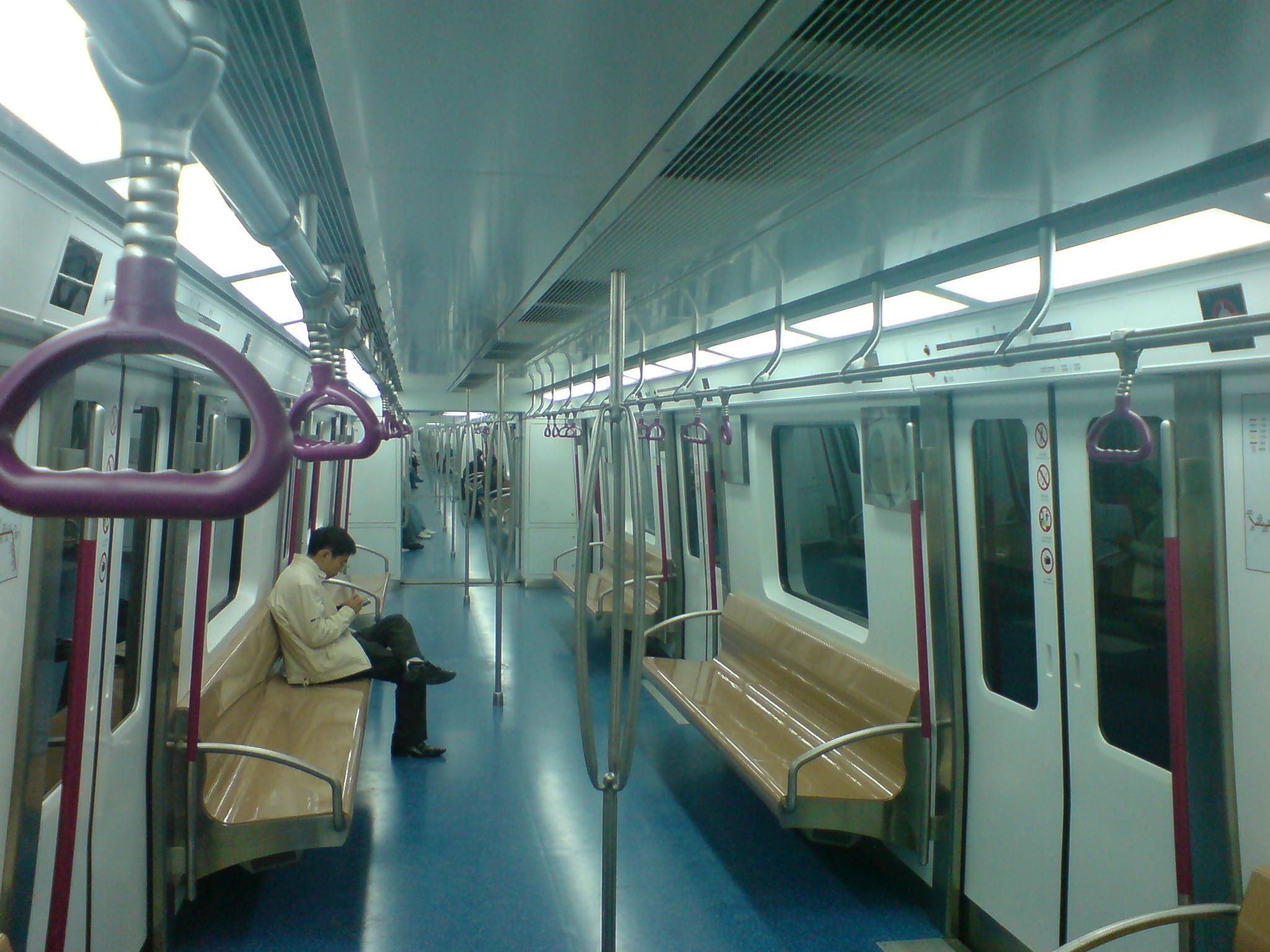 北京地铁5号线车厢